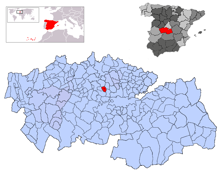 Barcience en la provincia de Toledo